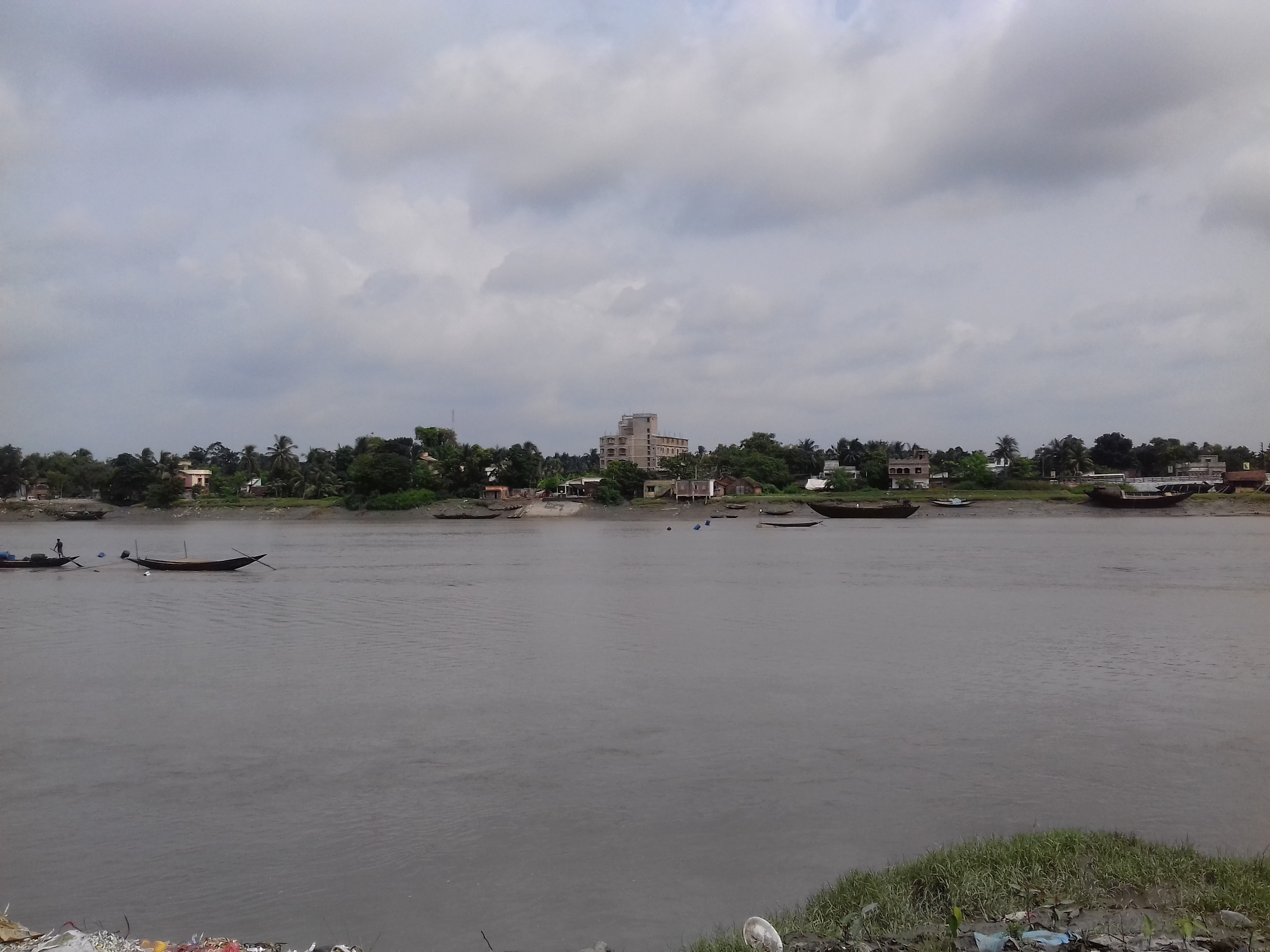 বসিরহাট শহরে ইছামতি নদী